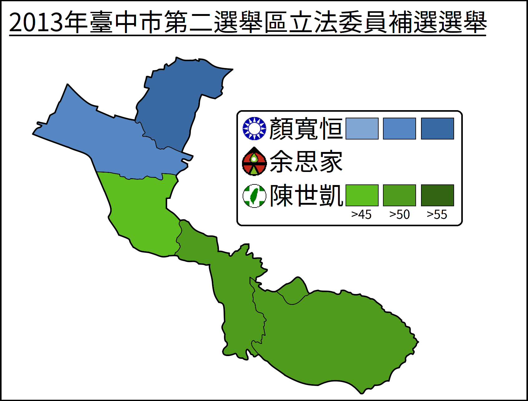 2013年臺中市第二選舉區立法委員補選選舉